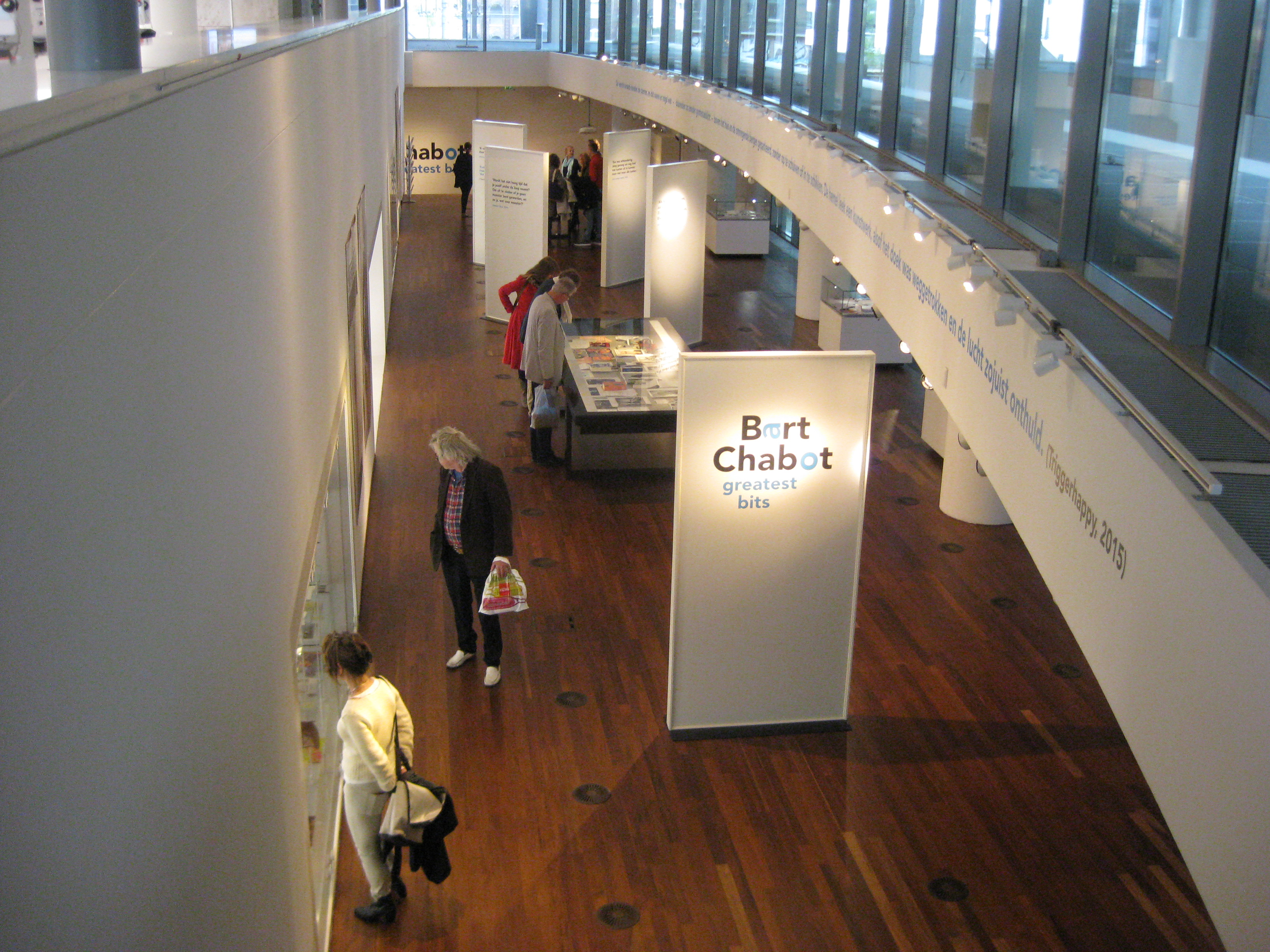 Tentoonstelling van Bart Chabot in de Openbare Bibliotheek Amsterdam 2015